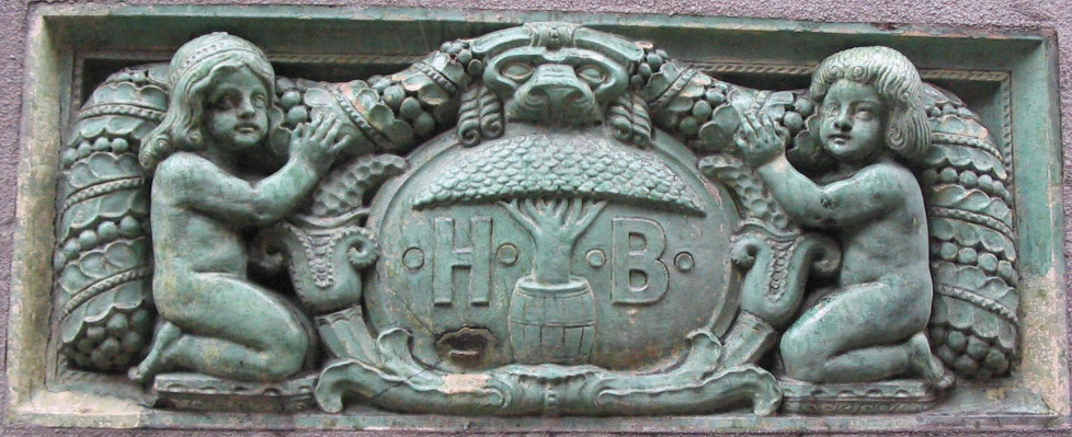 Jeden z detali architektonicznych wyburzonych budynków przy placu Kościuszki w Bytomiu